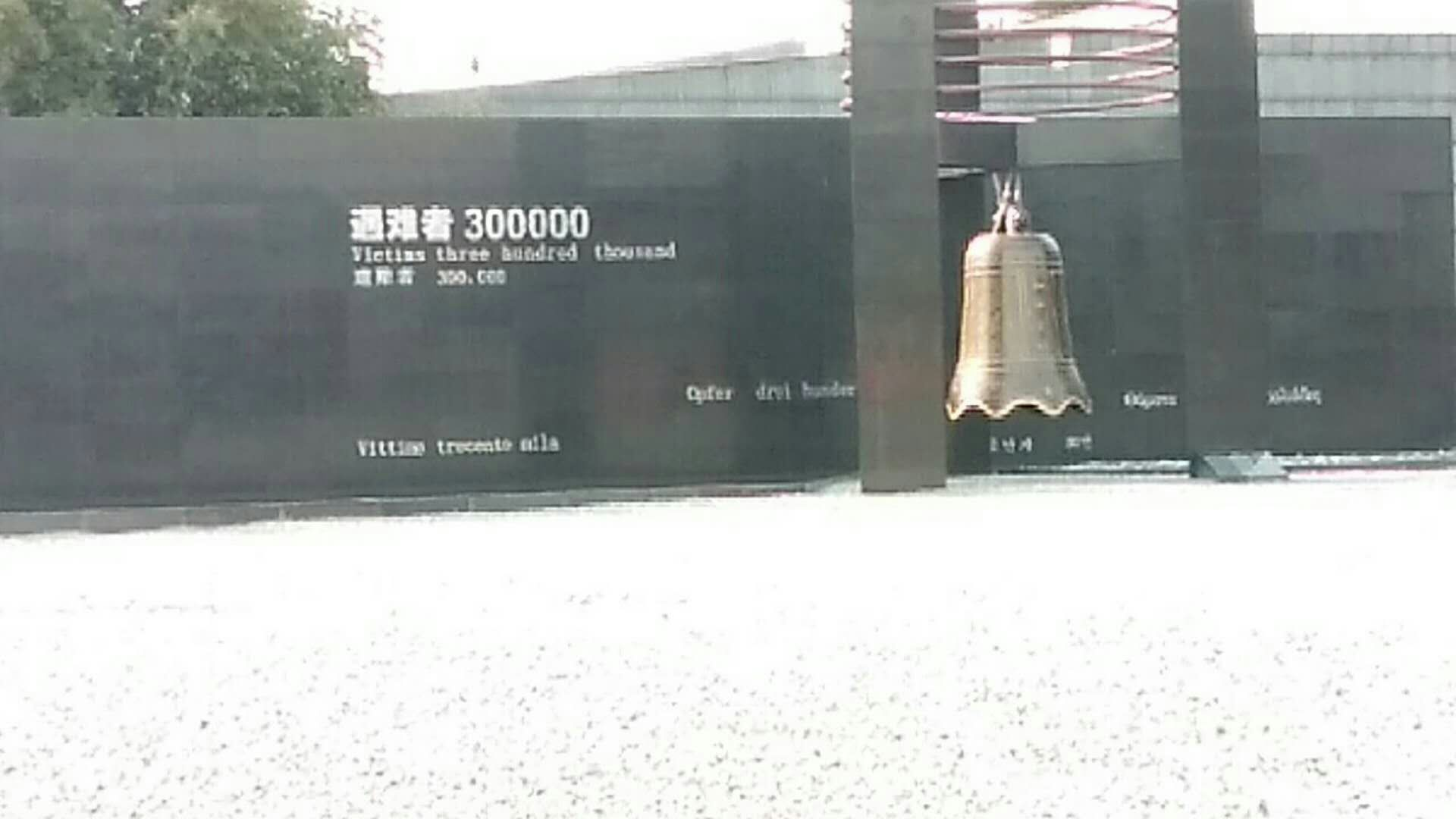 拍摄地:侵华日军南京大屠杀遇难同胞纪念馆